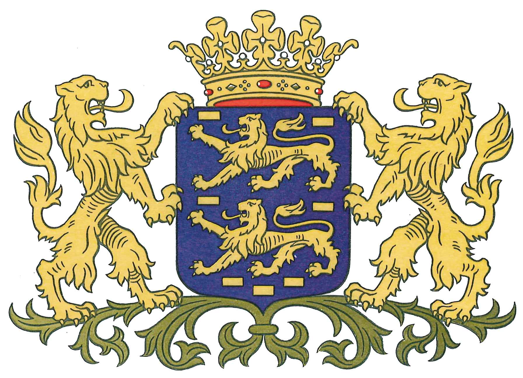 Wapen van de provincie Friesland (authentieke versie)